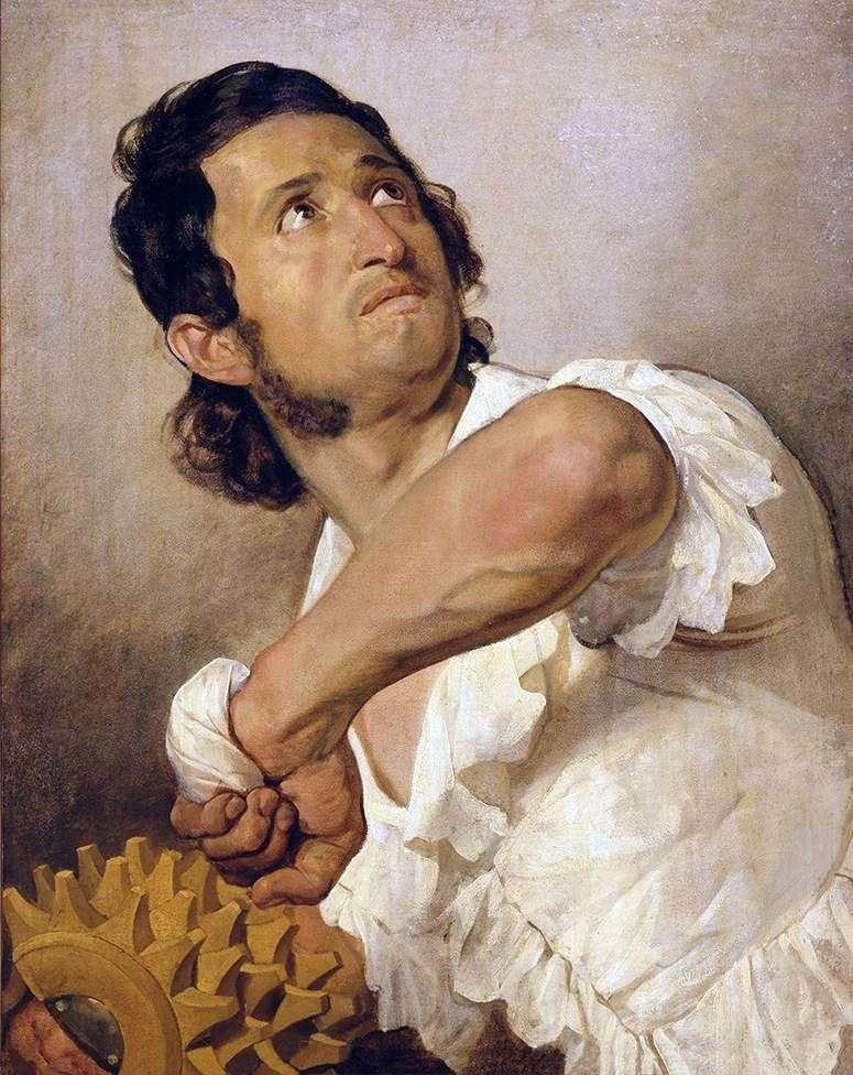 Портрет Доменико Марини (Игрок в мяч)